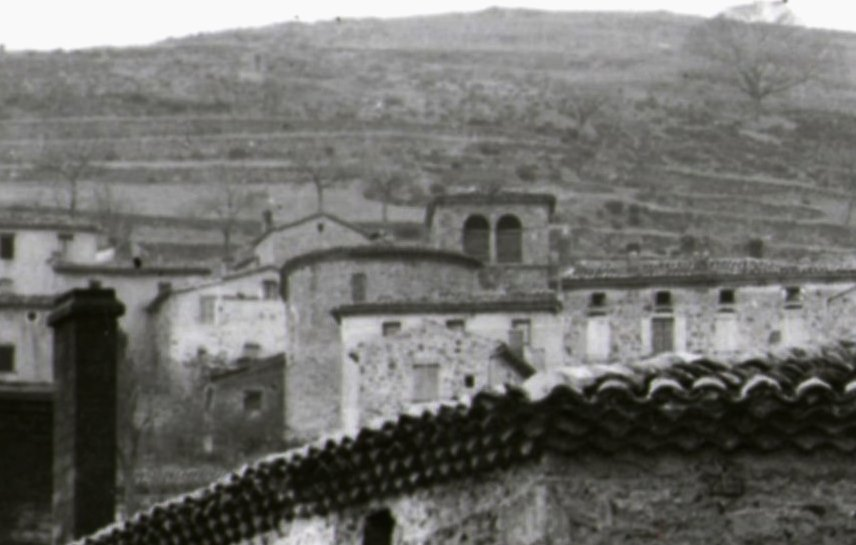 Saint-Marcel-lès-Annonay église ancienne 1806